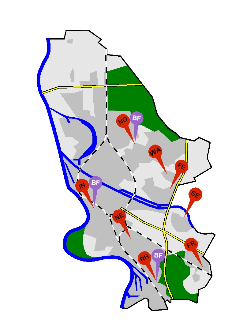 Verteilung der Mannheimer Feuerwachen im Stadtgebiet, BF = Wache der Berufsfeuerwehr, rot = Gerätehäuser der Freiwilligen Wehren Innenstadt (IN), Neckarau (NE), Nord (NO), Wallstadt (WA), Feudenheim (FE), Rheinau (RH), Seckenheim (SE) und Friedrichsfeld (FR)